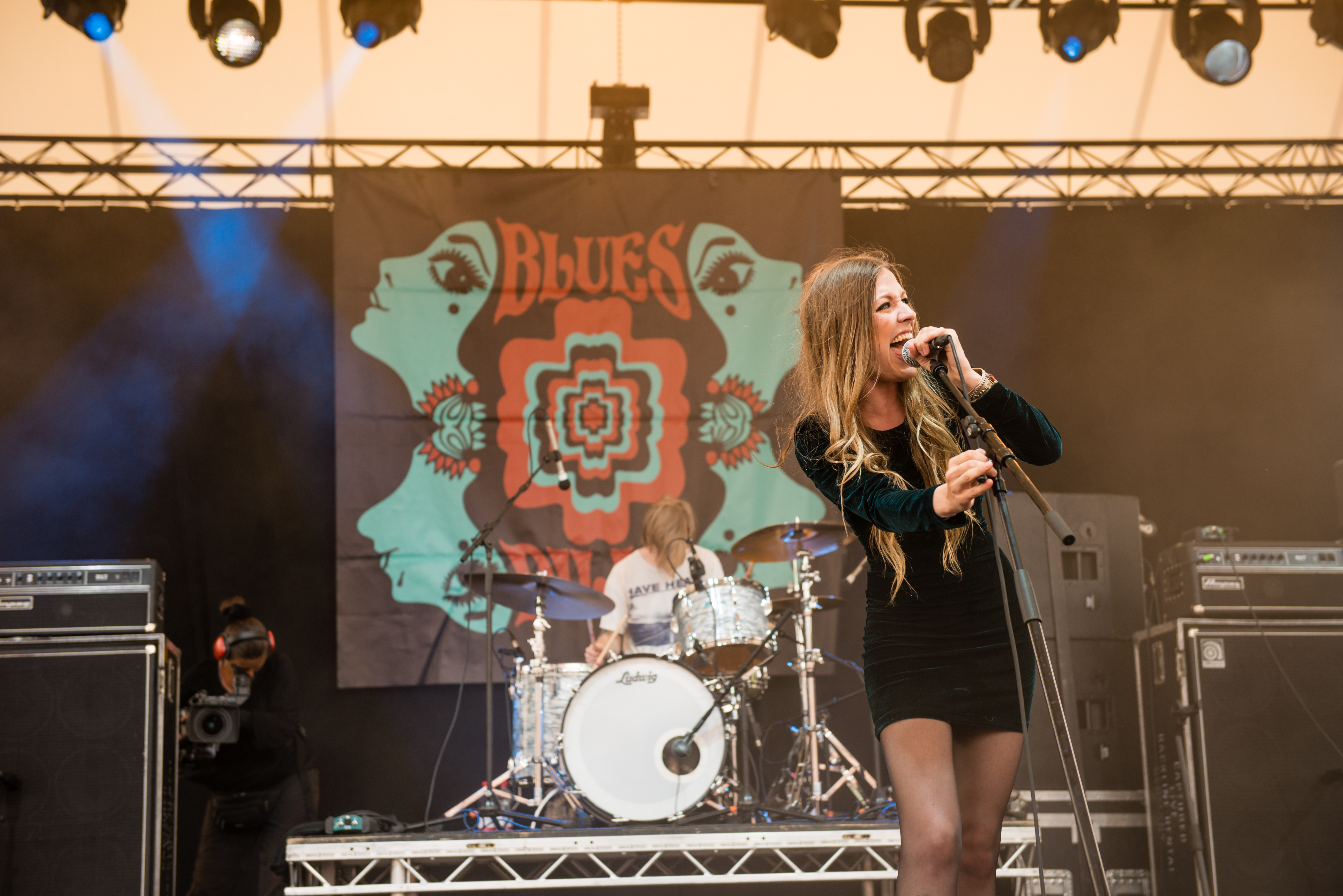 'Rock Hard Festival 2014 - Gelsenkirchen': 'Blues Pills'